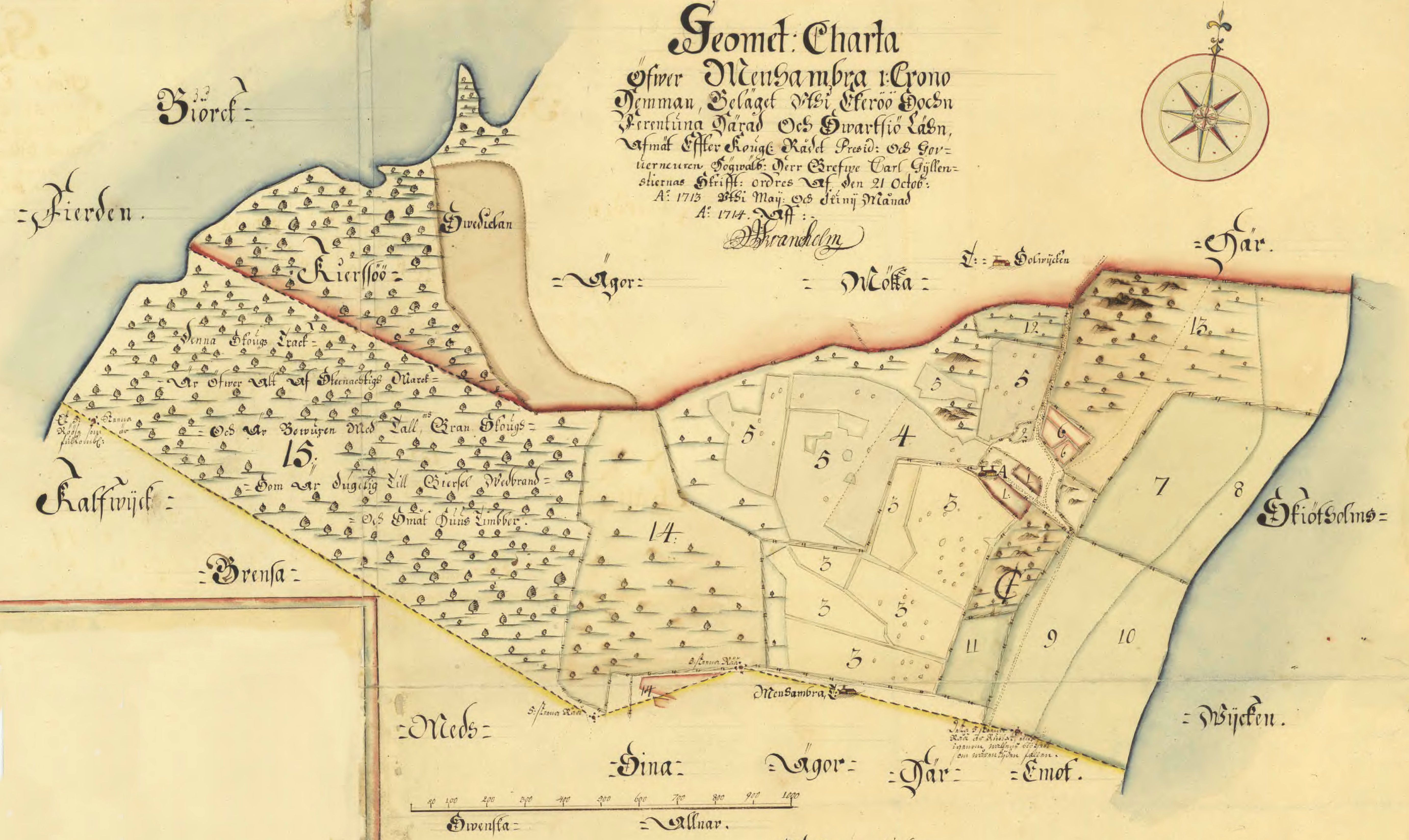 Geometrisk Charta öfver Menhambra 1 Crono Hemman